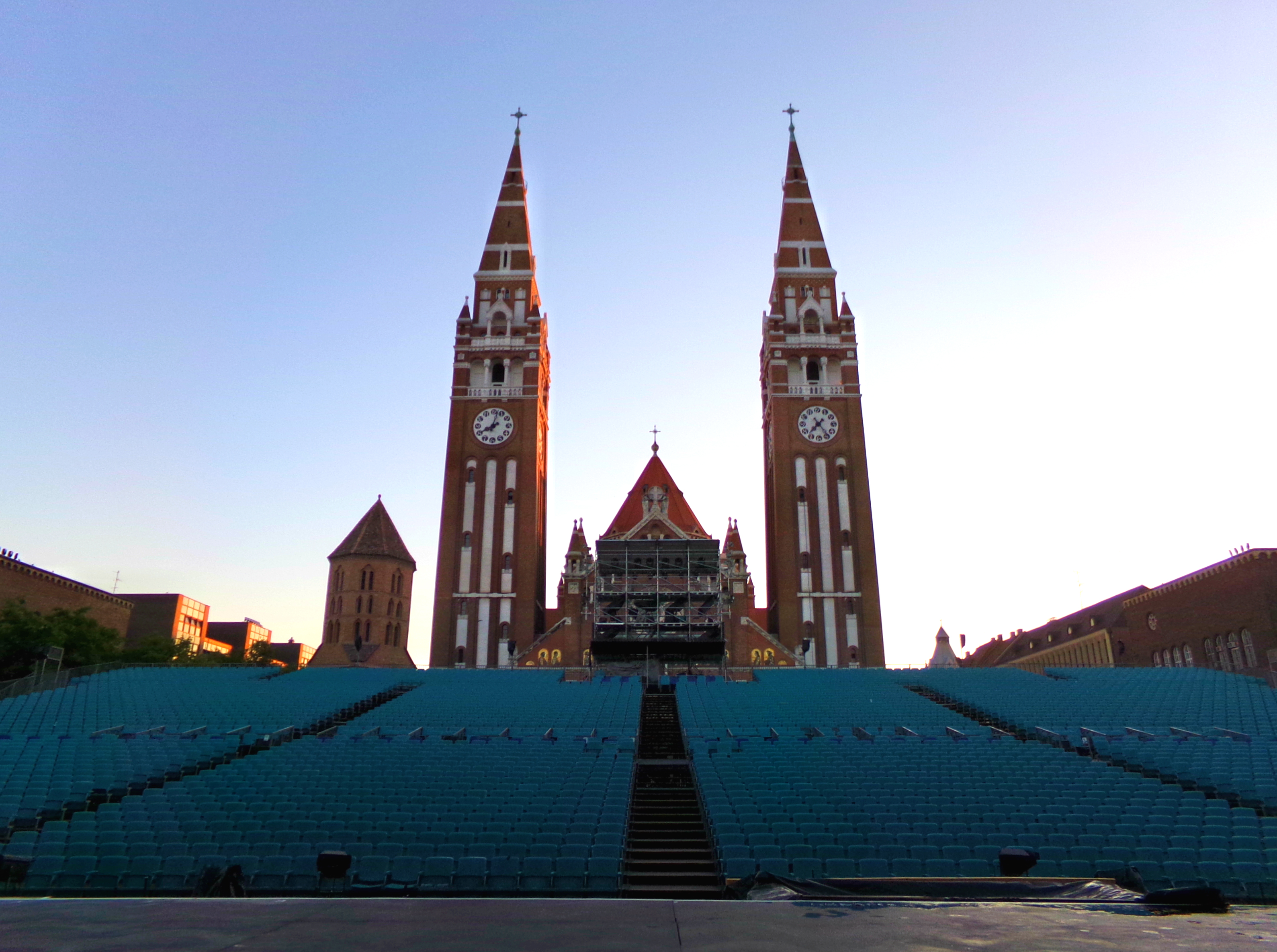 Reggeli fények a Szegedi Szabadtéri Játékok nézőtere és a Szegedi Dóm mögött